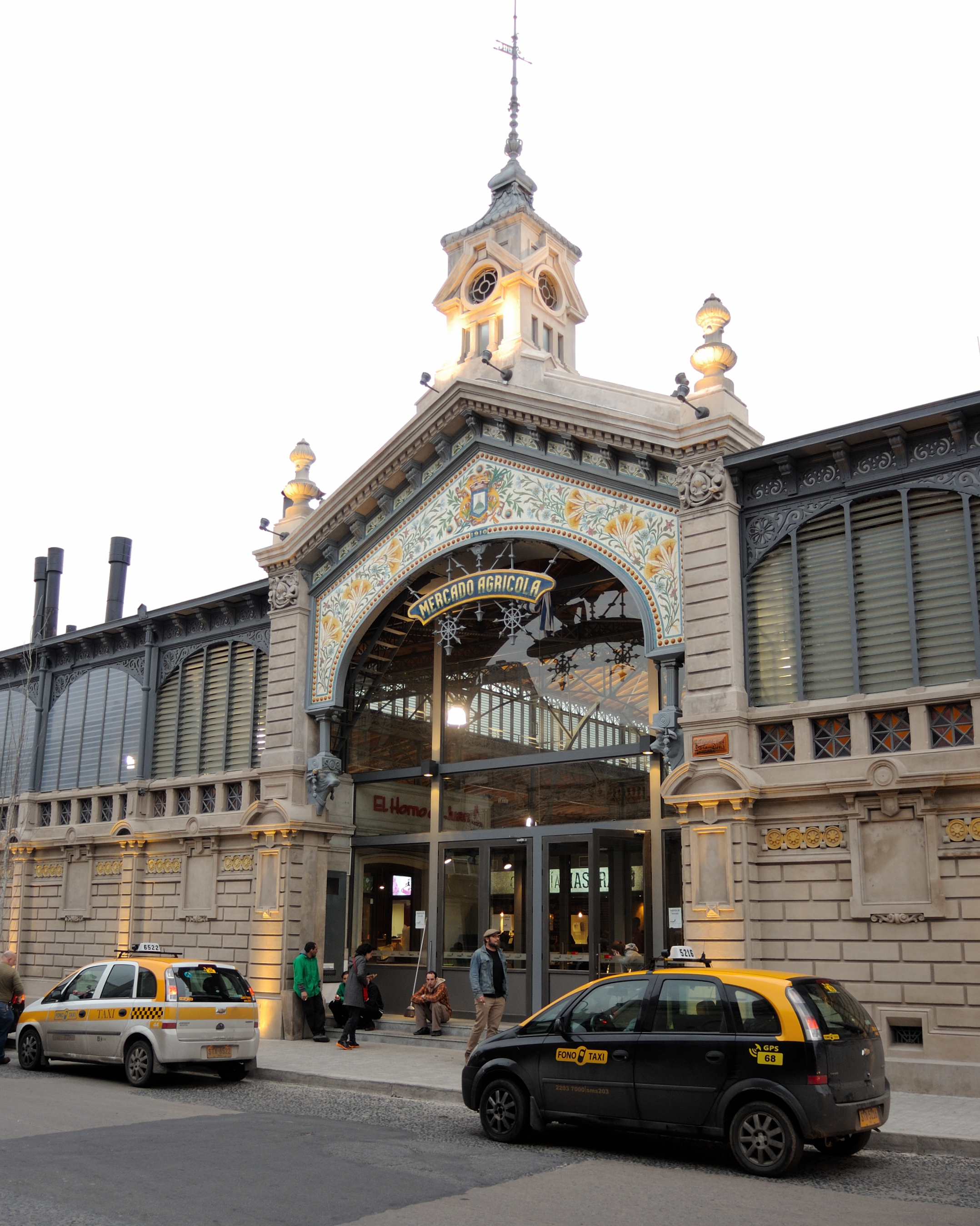 Puerta de entrada principal del Mercado Agrícola de Montevideo